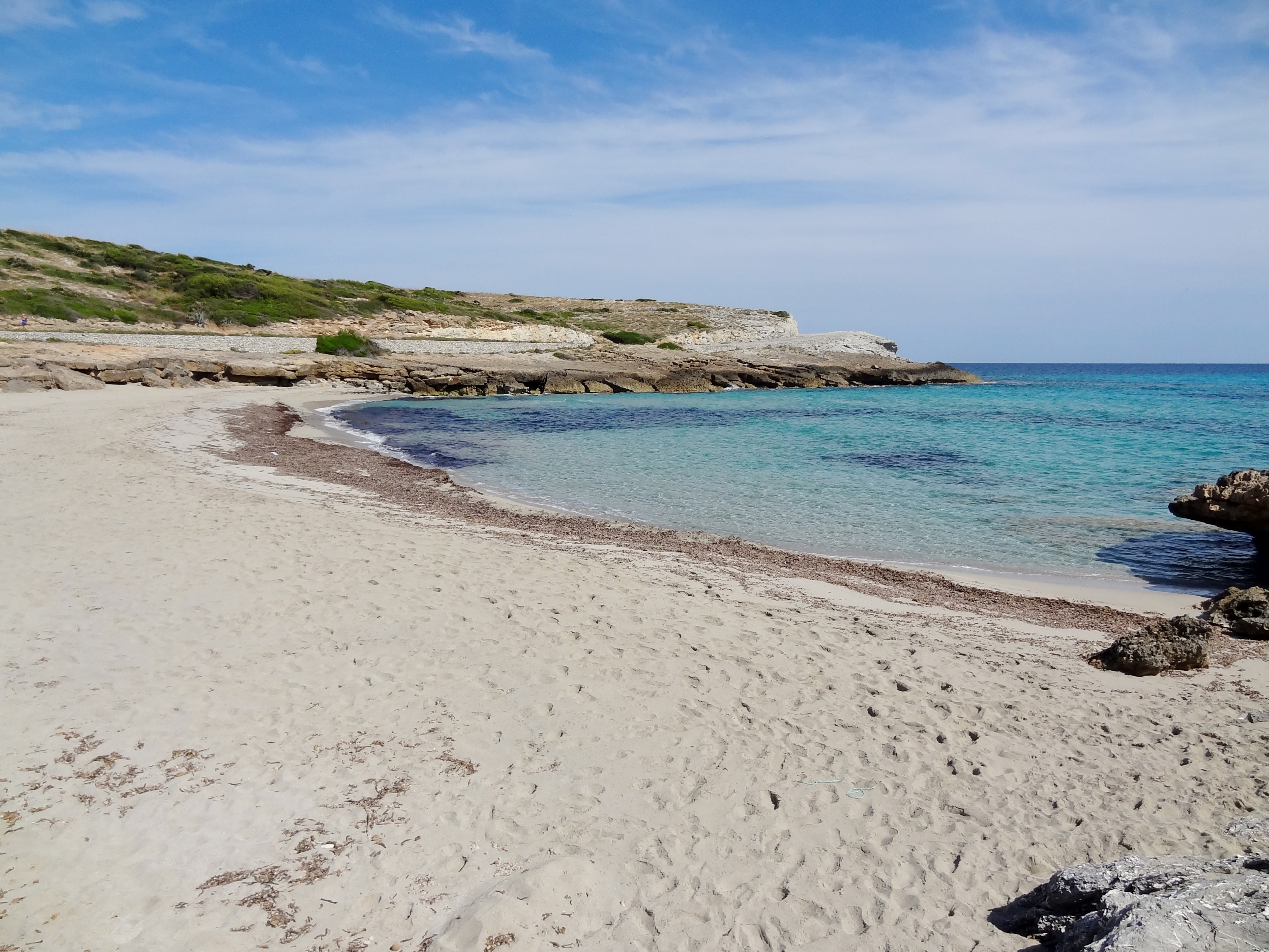 Cala Mitjana, Gemeinde Artà, Mallorca, Spanien